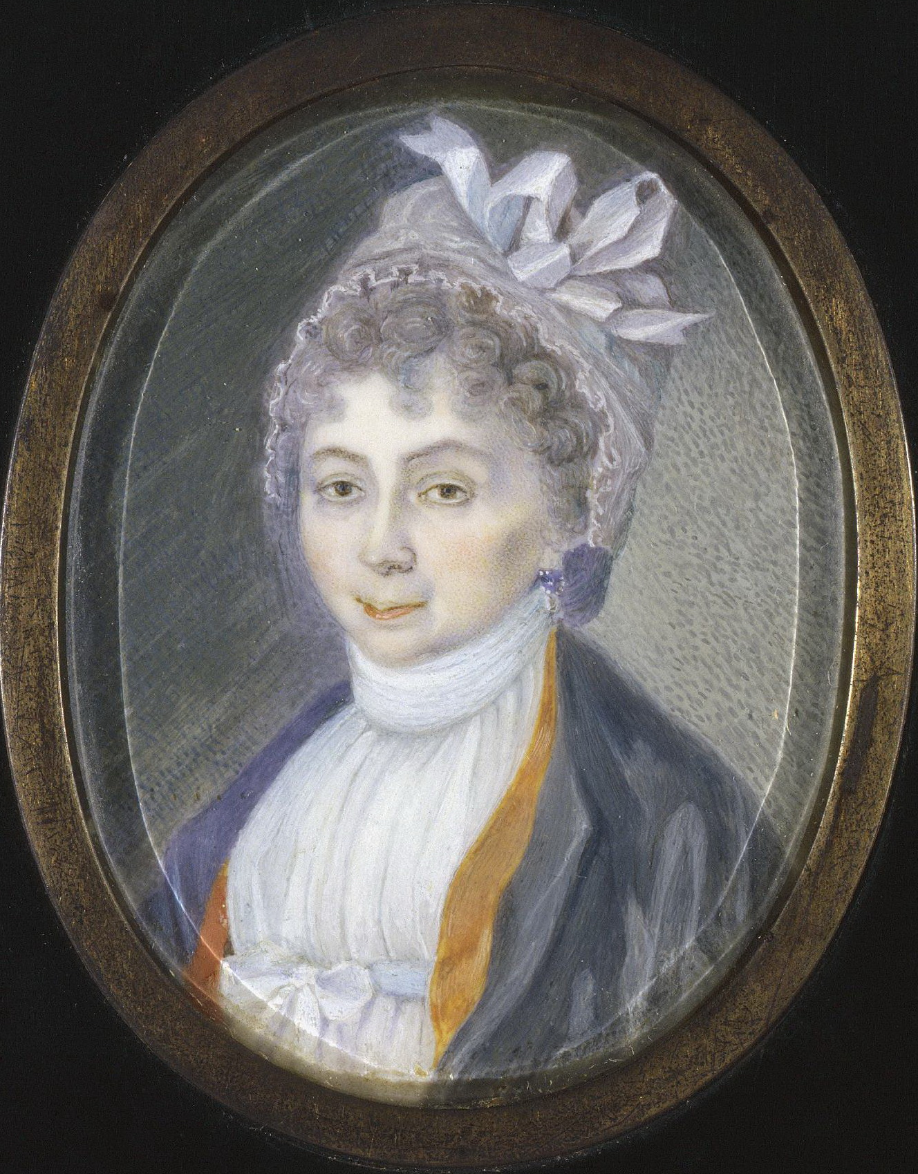 Анна Артемьевна Бутурлина(1777-1854), урож. Воронцова.